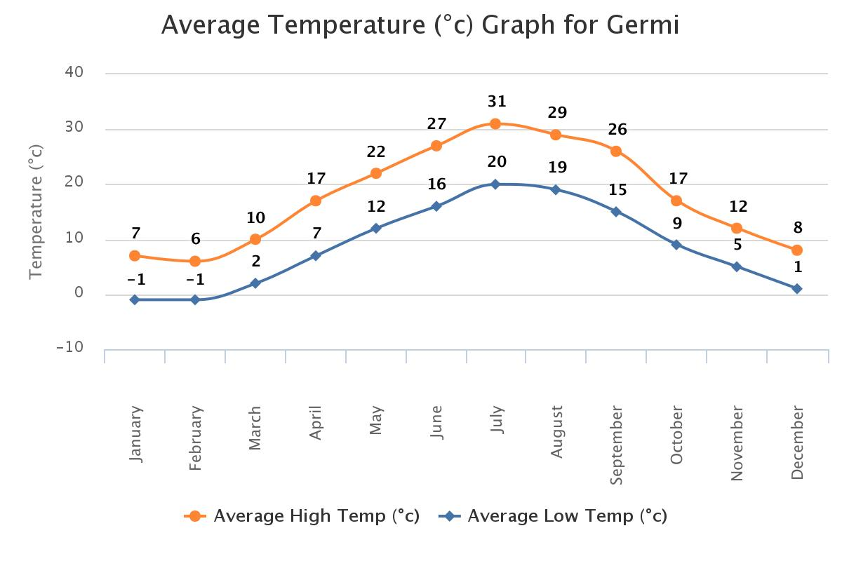 Germi Temperature Graph